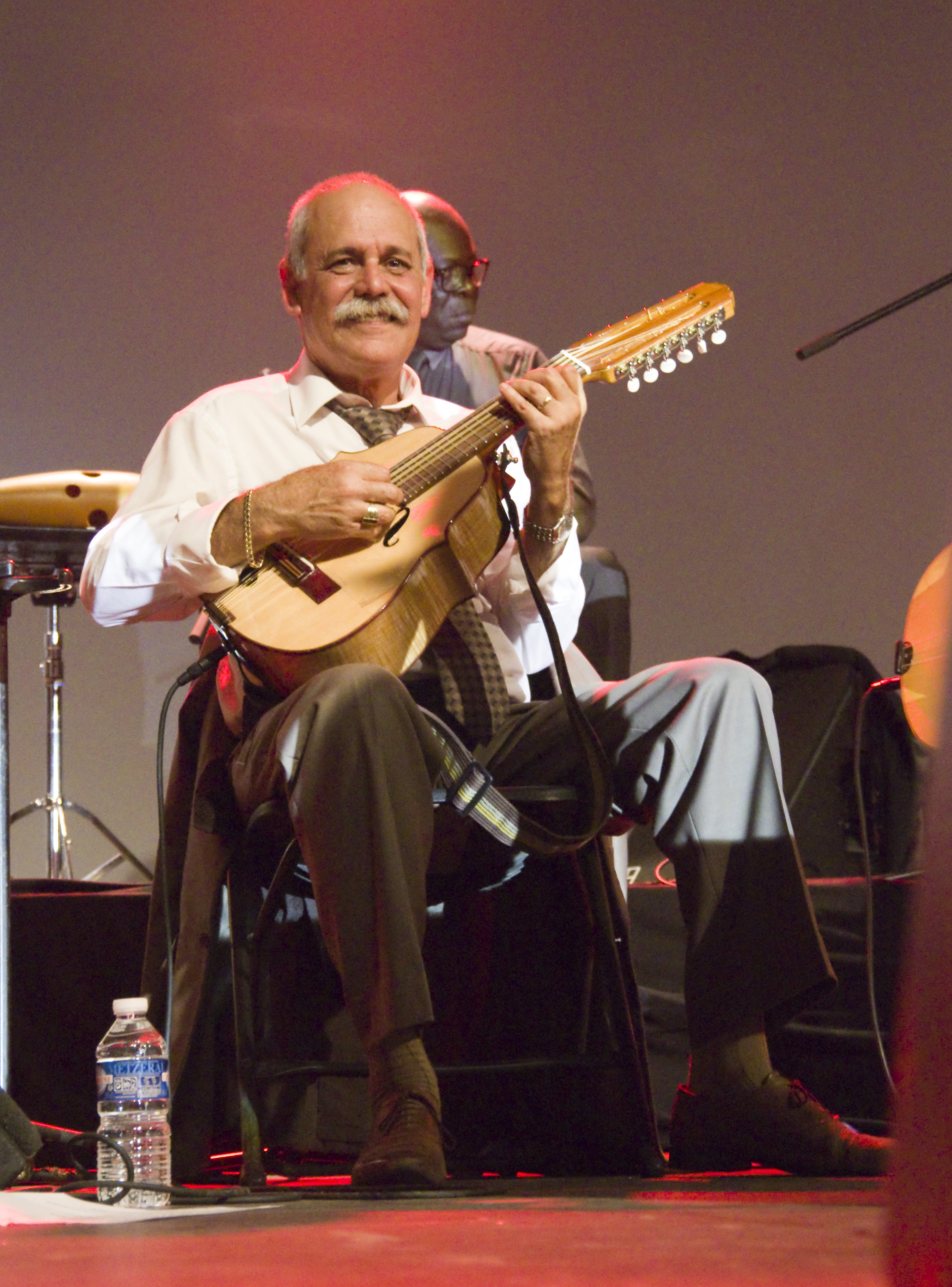 Das Zelt-Musik-Festival 2015 in Freiburg im Breisgau. 06.07.2015 Orquesta Buena Vista Social Club Barbarito Torres